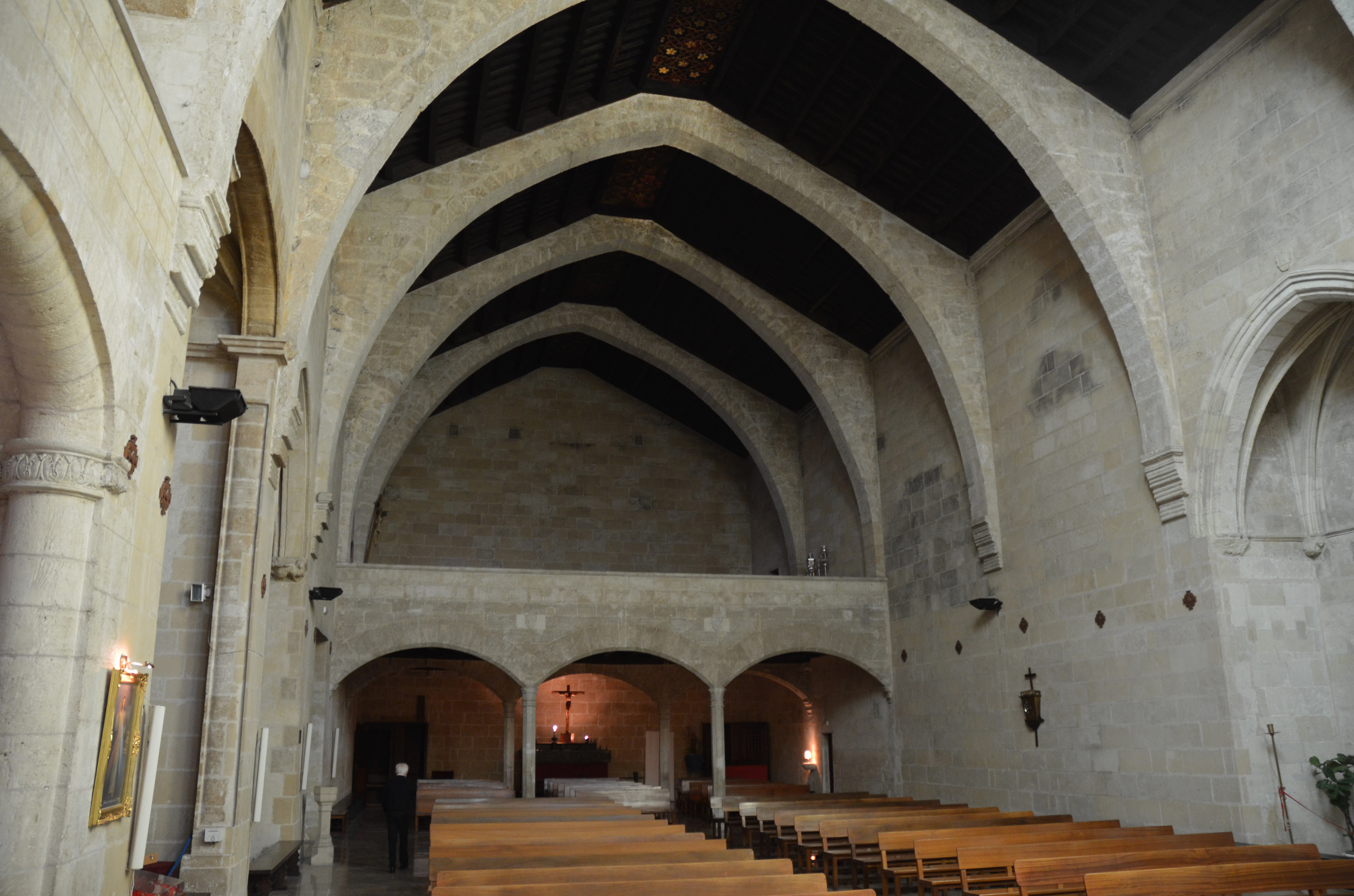 Església de Santa Margalida de Ciutat de Mallorca.